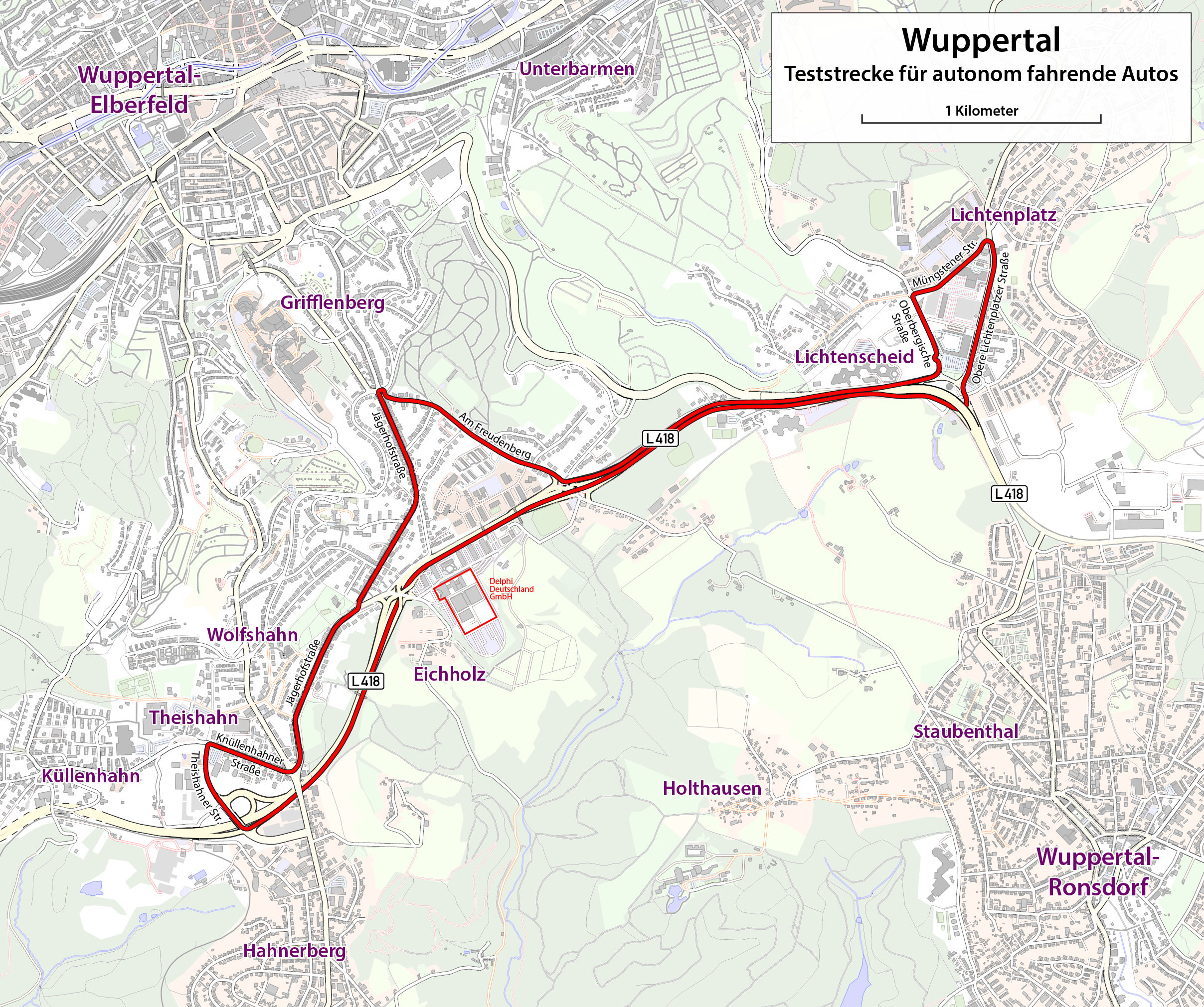 Karte der Teststrecke für autonom fahrende Autos in Wuppertal